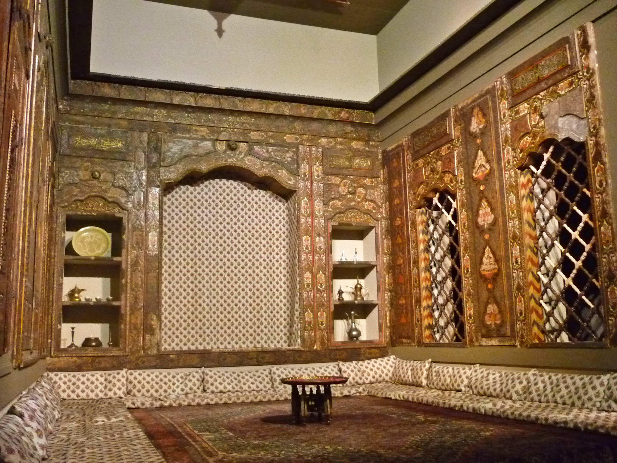 Das Dresdner Damaskuszimmer Collection: Museum für Völkerkunde Dresden